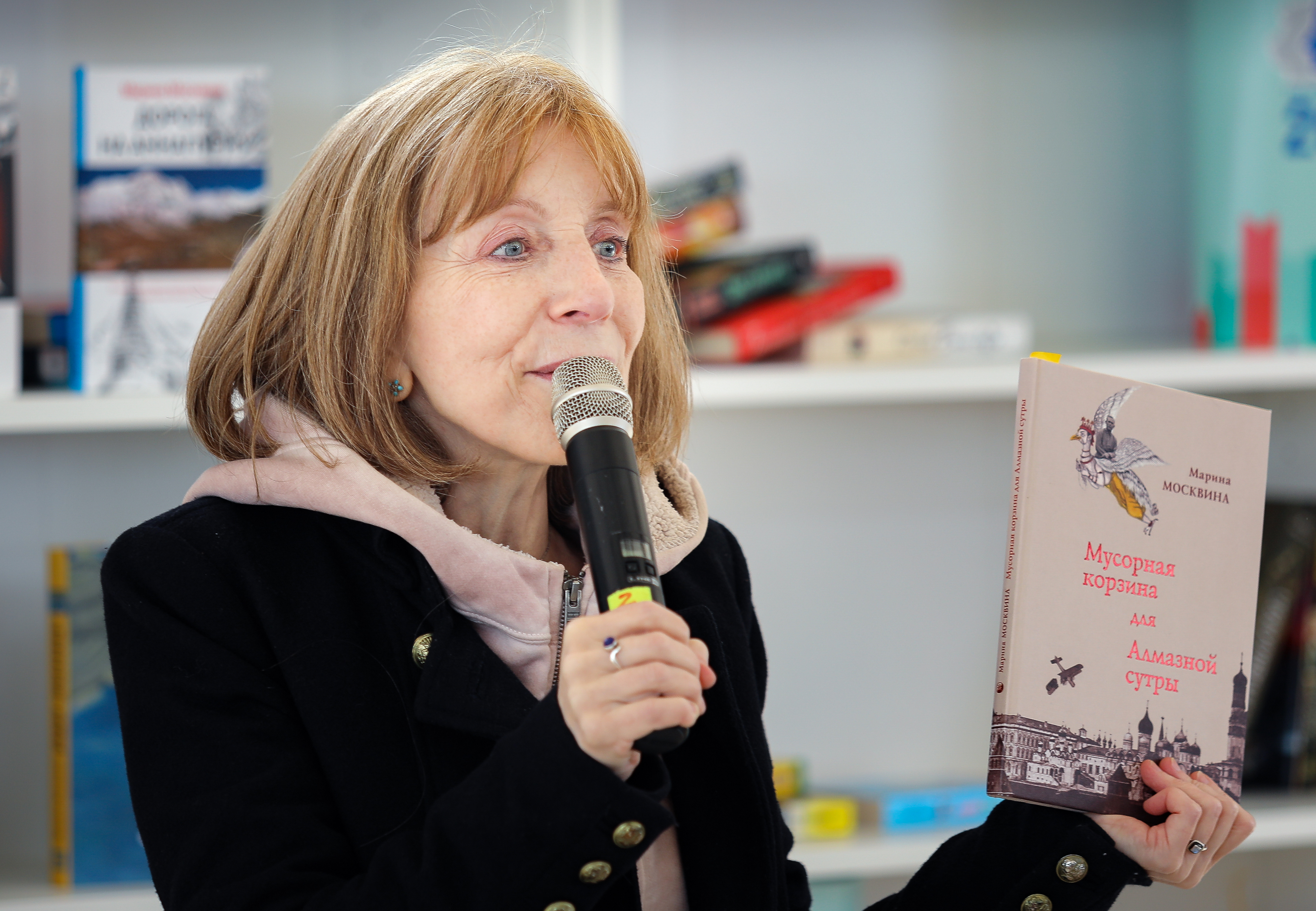 Марина Москвина (писатель) на книжном фестивале "Красная площадь"-2017.